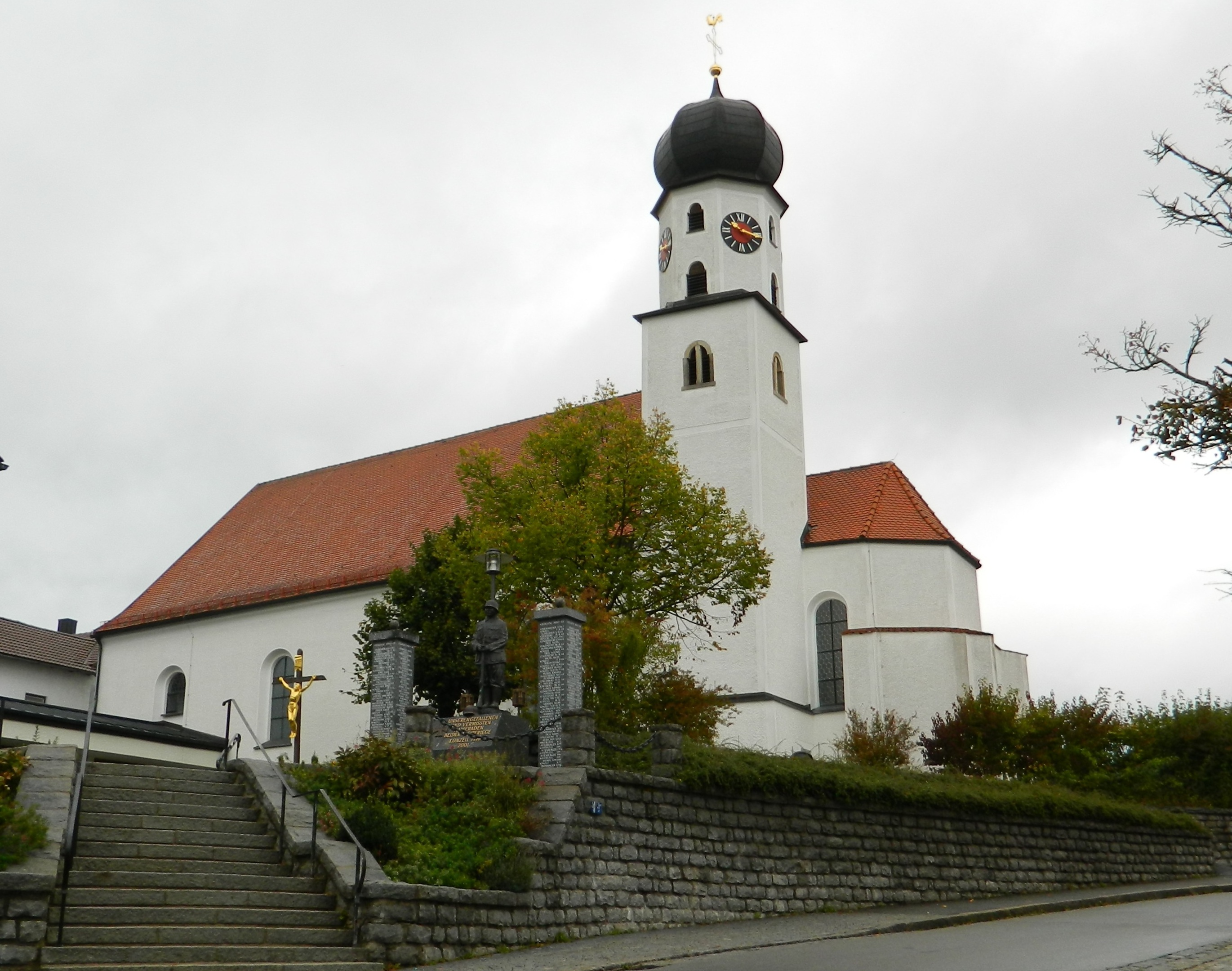 Kirche St. Martin in Konzell in Niederbayern